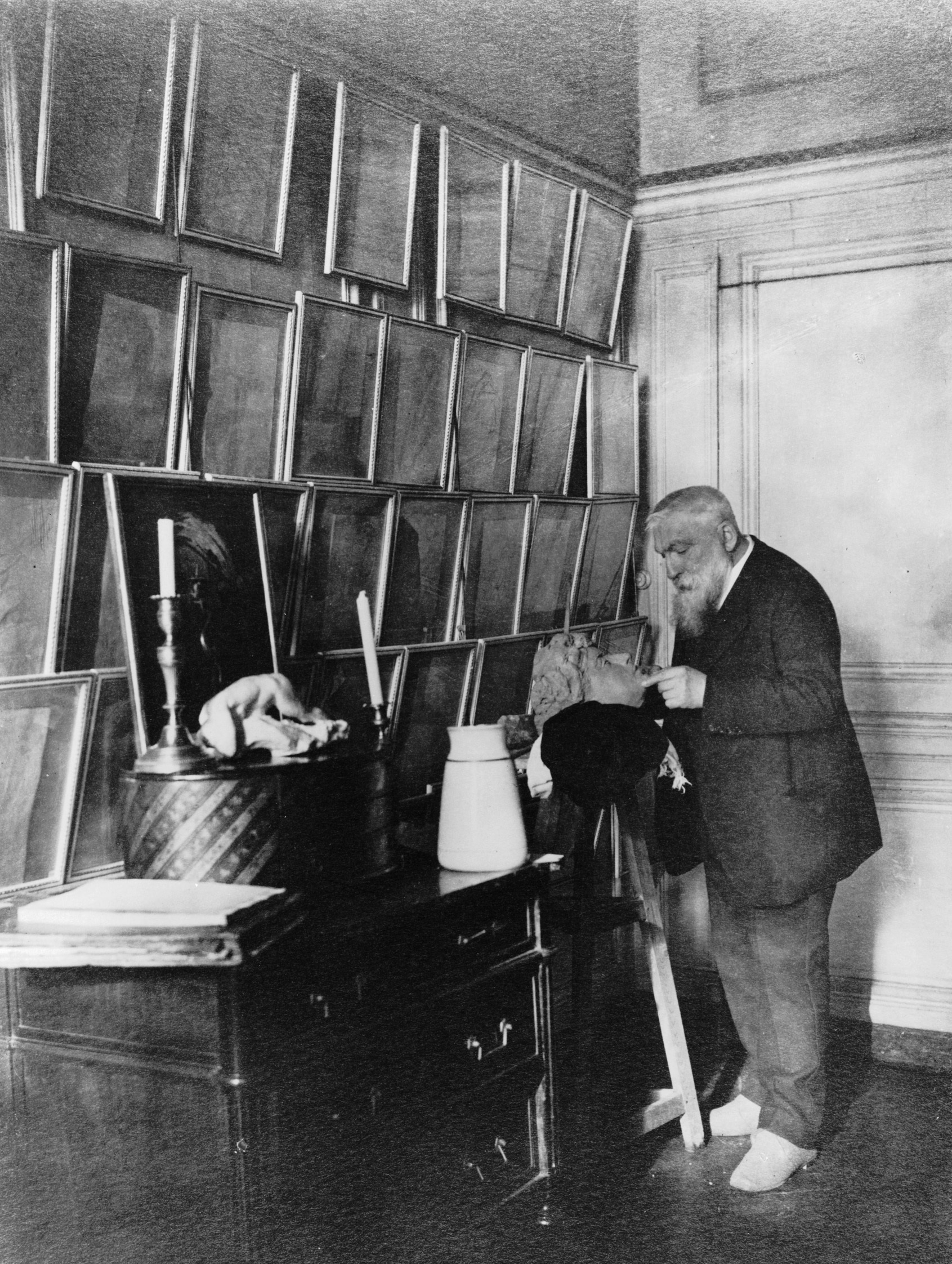 О. Роден в мастерской. Париж. 1910-е годы. Фотография П. Шумова